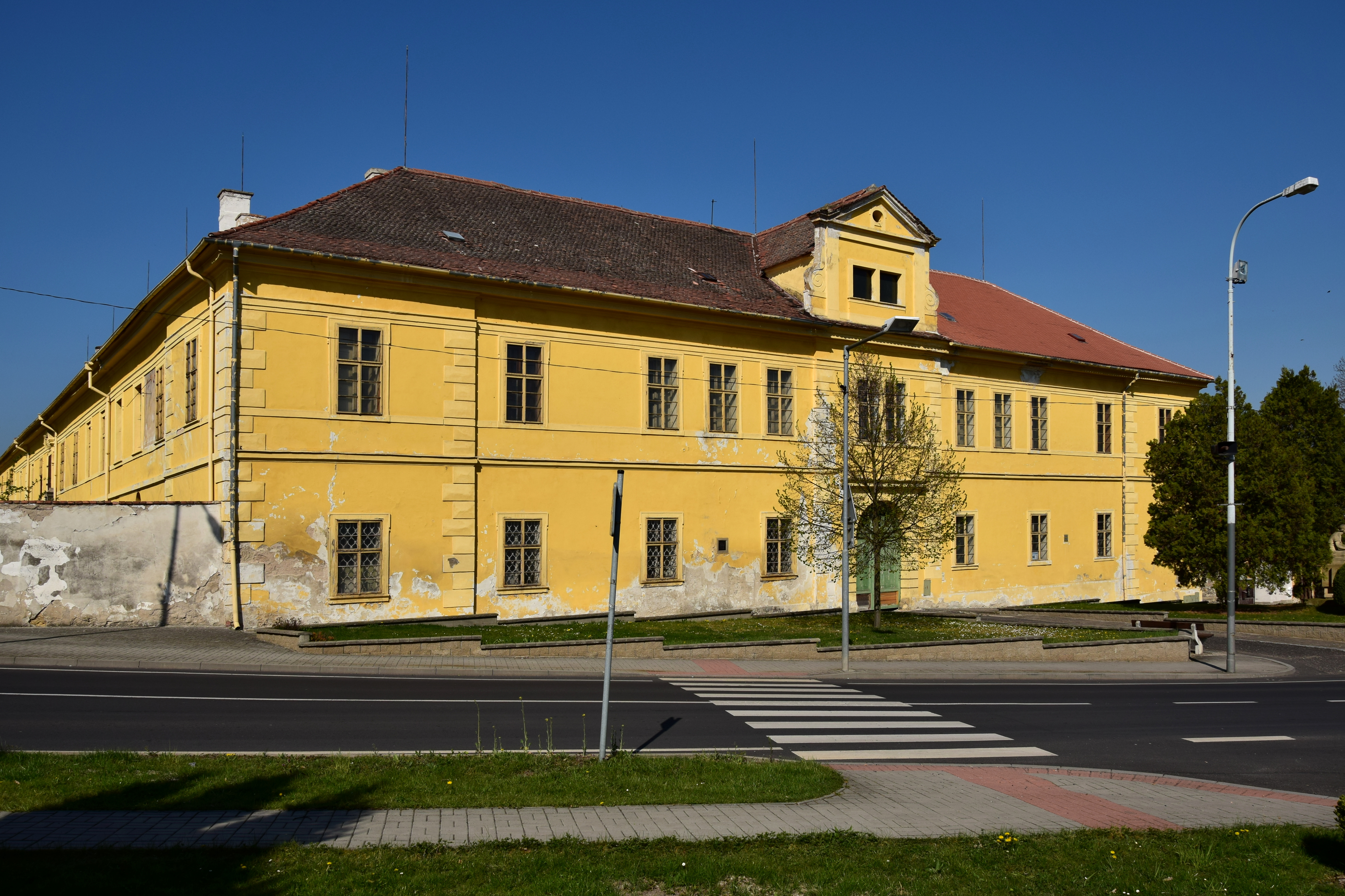 Zámek, Cítoliby 1, Cítoliby.